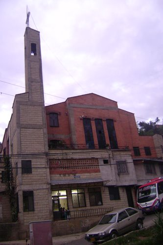 Fotografía del templo de la parroquia Santa Maria de la Sierra.AL oriente de la ciudad de Medellin en la comuna 8 Villa hermosa.